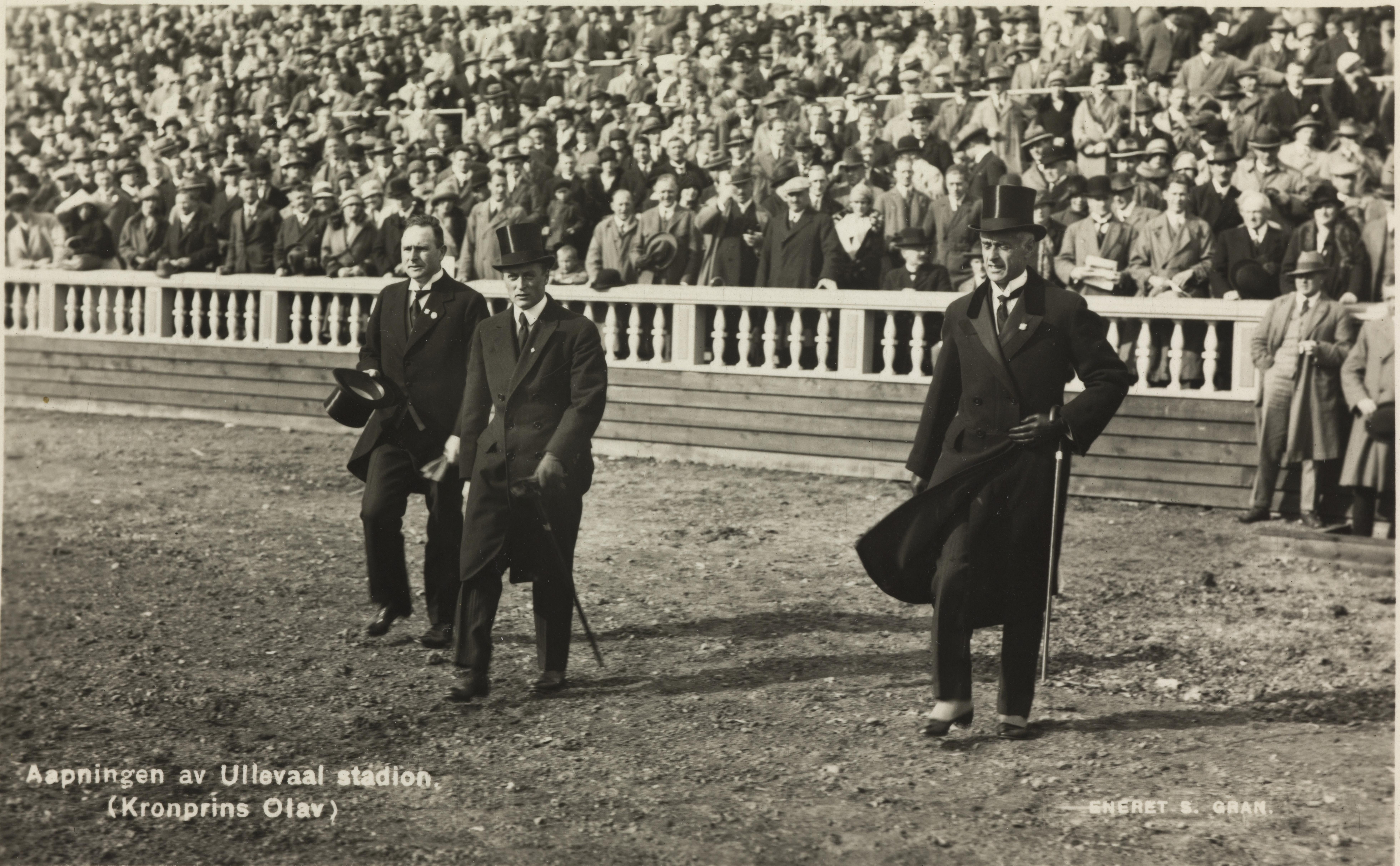 Bildet er hentet fra Nasjonalbibliotekets bildesamling. Anmerkninger til bildet var: Ullevål stadion ble offisielt åpnet i 1926 ved at kronprins Olav selv tok avspark i kampen mellom Lyn og svenske Örgryte IS. (Kilde: Depicted person: Olav V konge av Norge